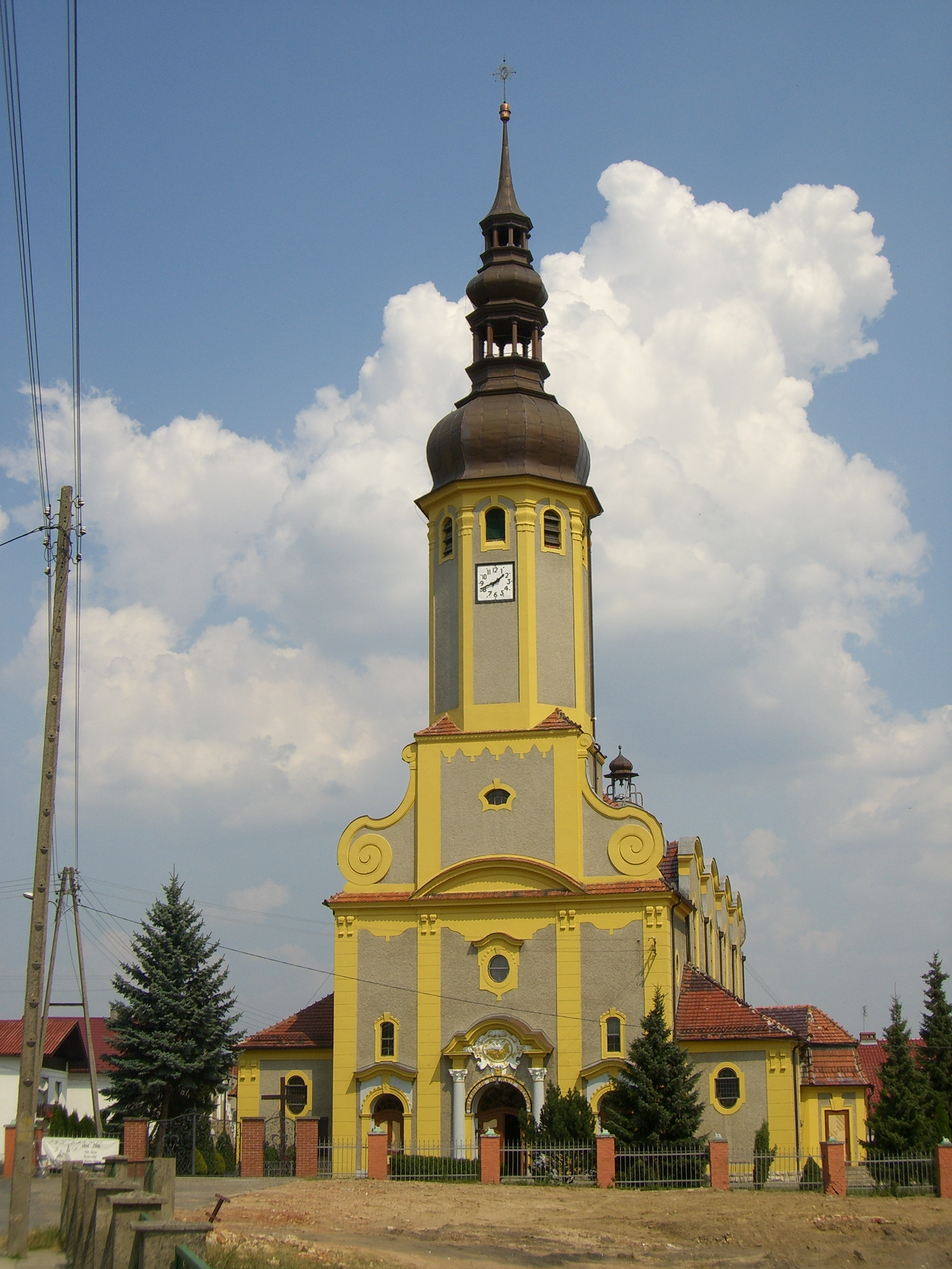 front kościoła parafialnego w Łanach